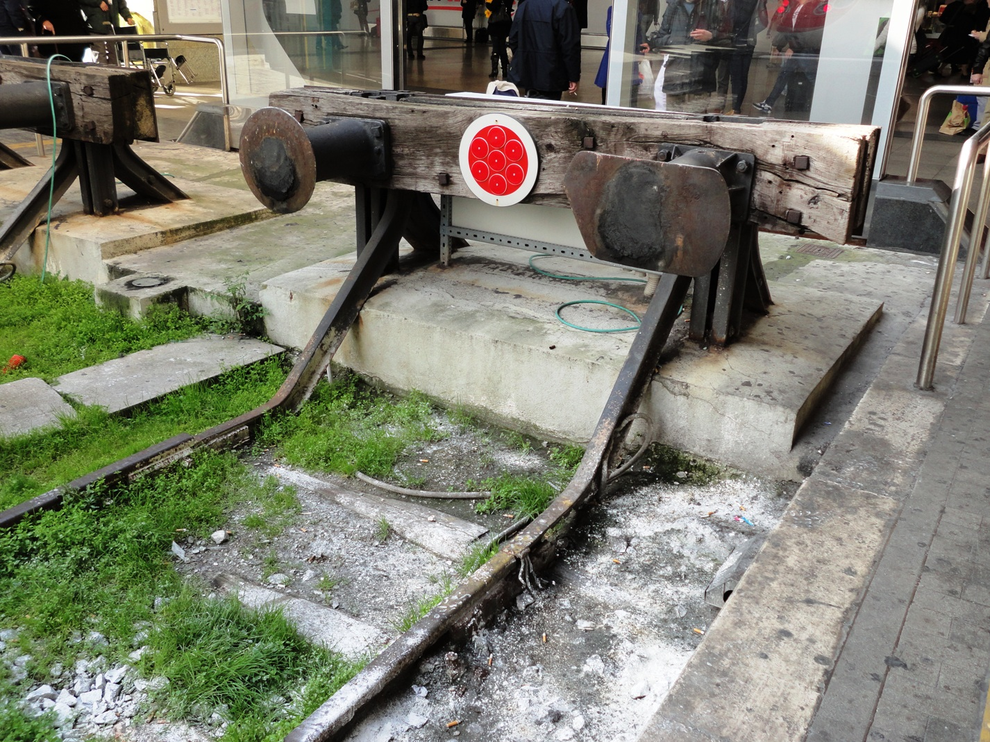 Il respingente al binario 1 di Roma Termini